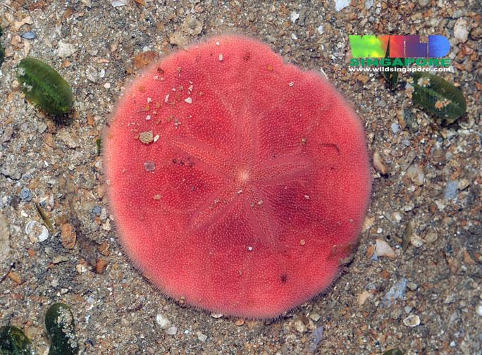 Pink sand dollar (Peronella lesueuri)